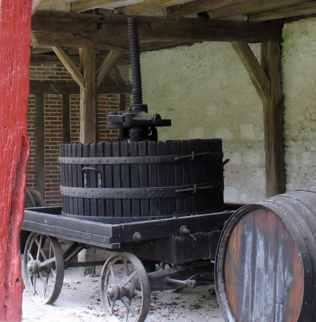 Pressoir à vin, château de Chenonceau, France